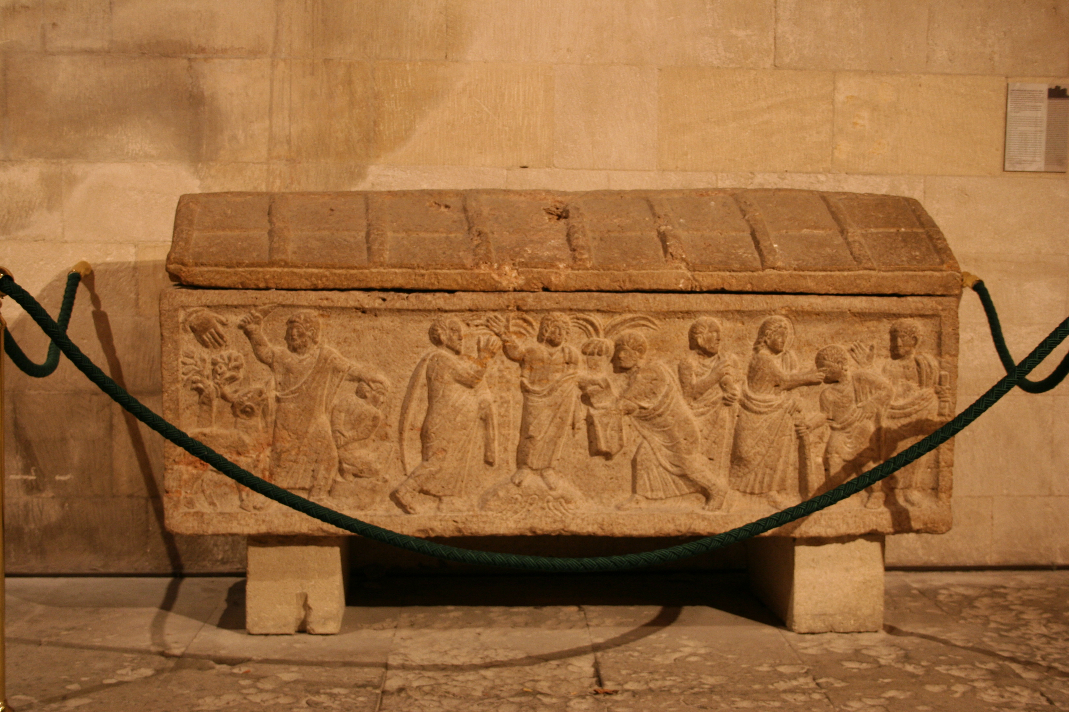 Sarcophage du milieu du Ve siècle représentant le sacrifice d'Abraham, trouvé en 1970. Il se trouve dans la travée droite de l'abbaye de Saint-Victor à Marseille; il contenait les restes d'une jeune femme âgée d'une vingtaine d'années.